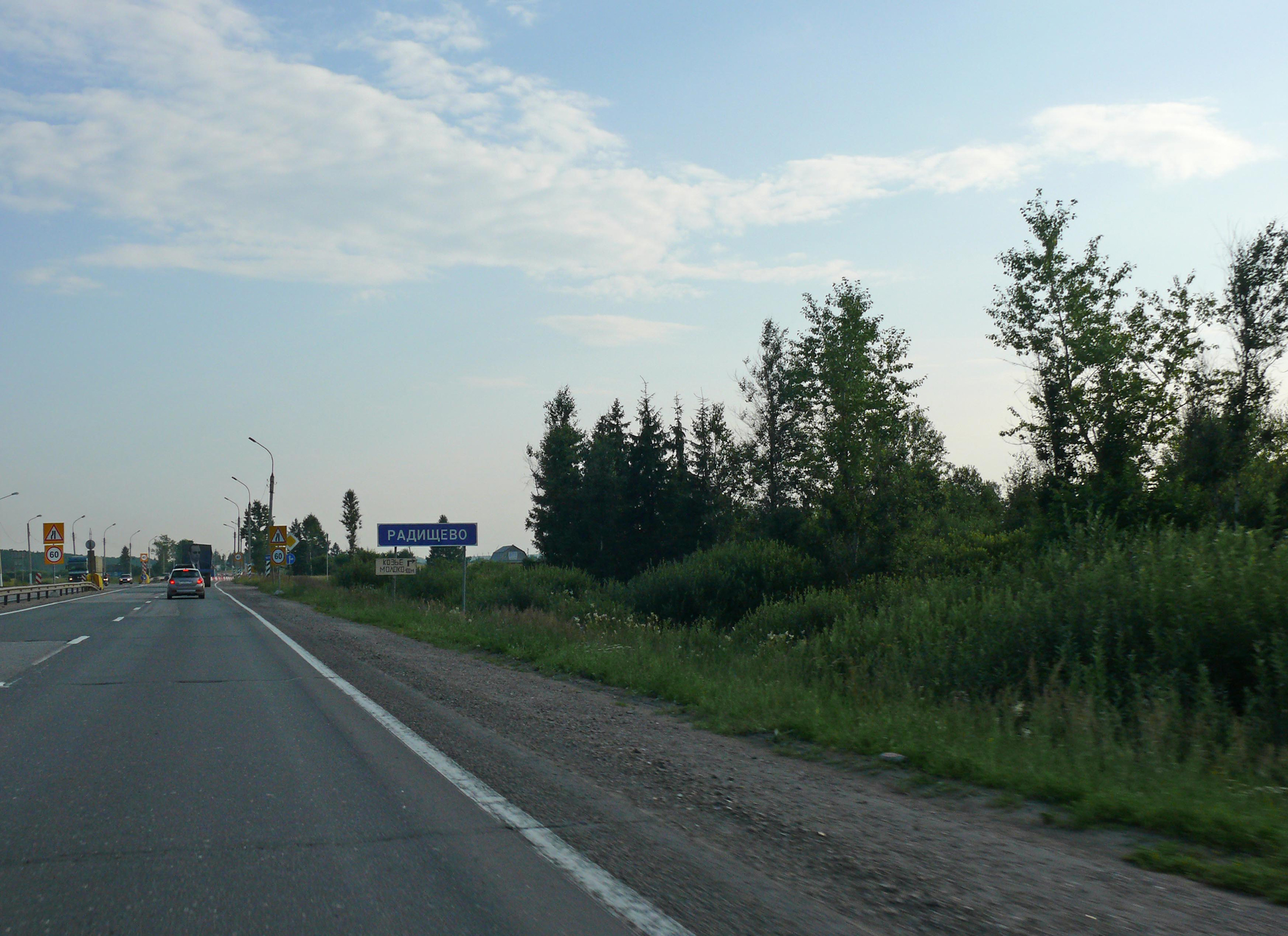 Деревня Радищево Чудовского района Новгородской области